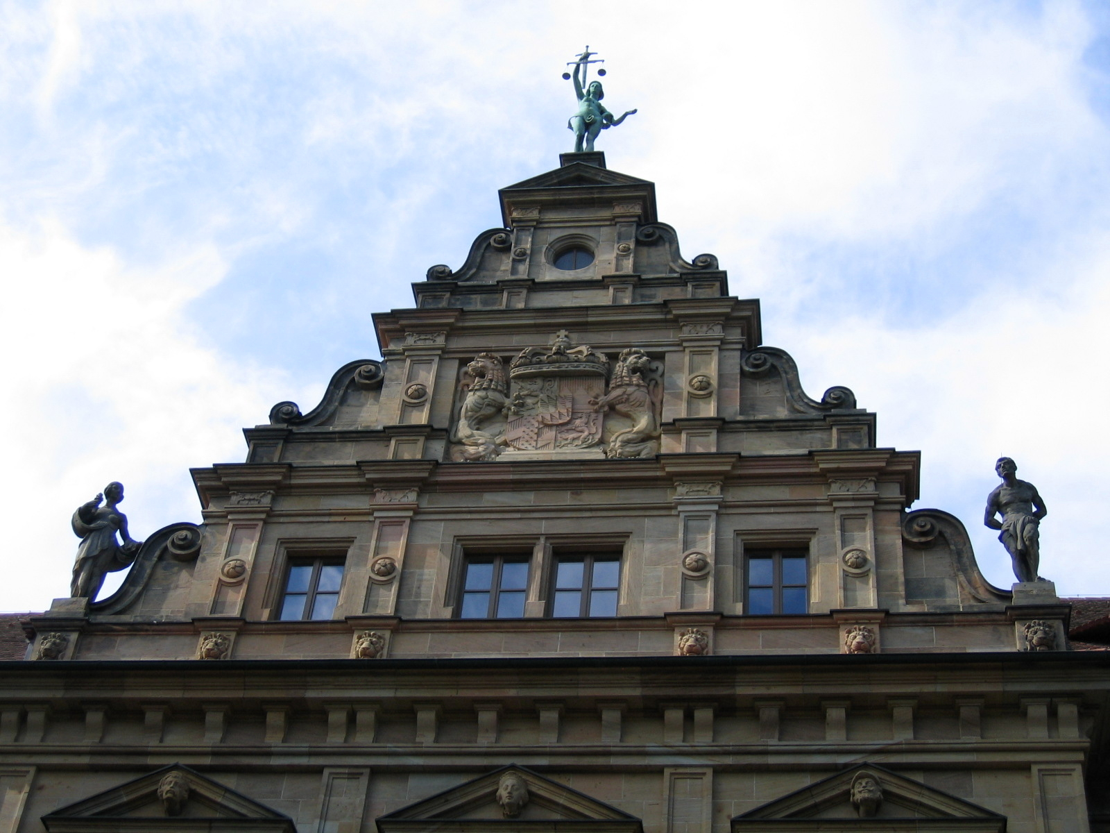 Description: Zentraljustizgebäude (Teilansicht); Oberlandesgericht, Staatsanwaltschaft beim Oberlandesgericht, Landgericht, Staatsanwaltschaft, Wilhelmsplatz 1 in Bamberg (Germany) Source: selbst fotografiert Date: 9. Sept. 2005 Author: Bubo